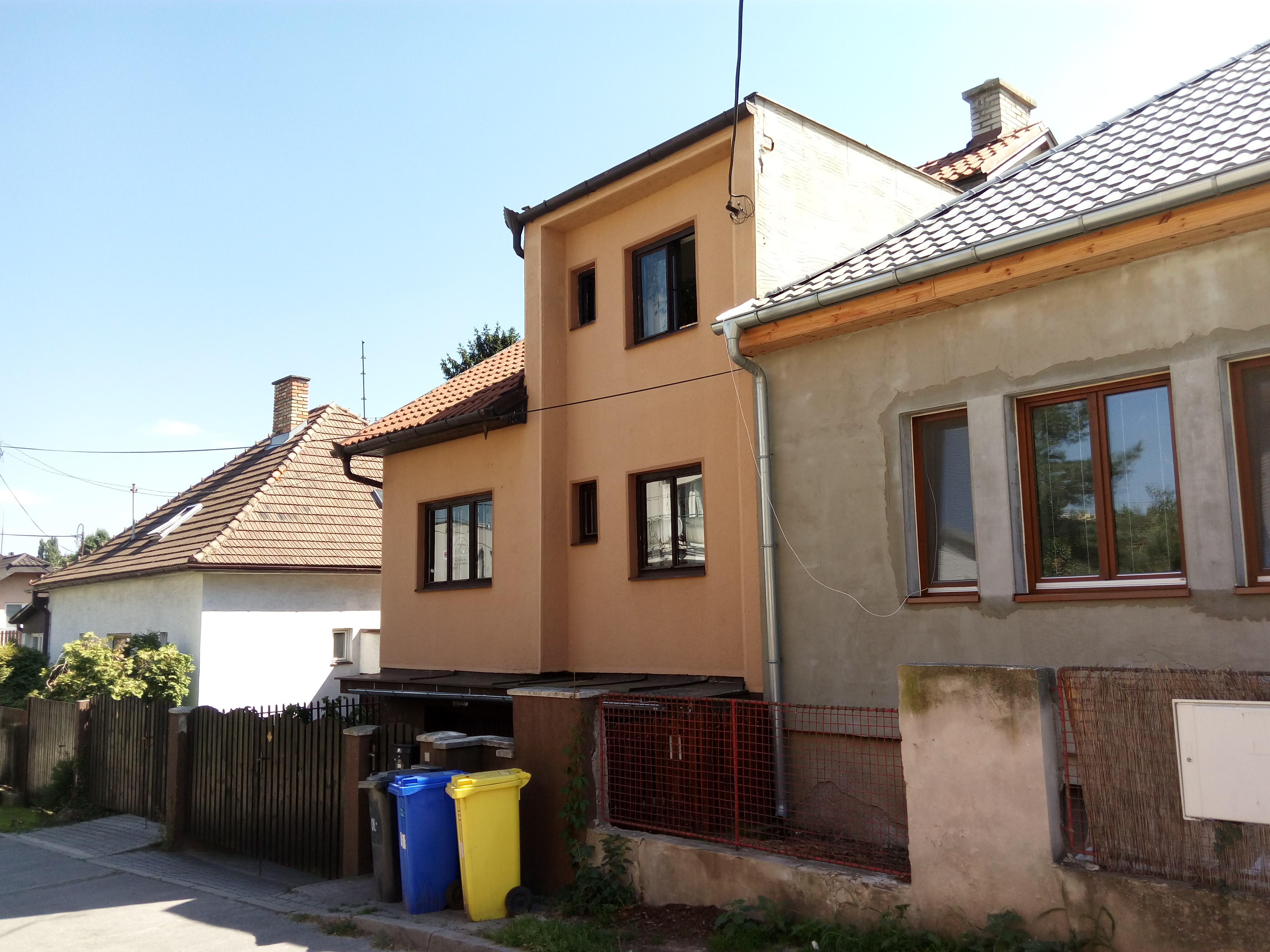 Na Riviére 7/A, Karlova Ves, Bratislava